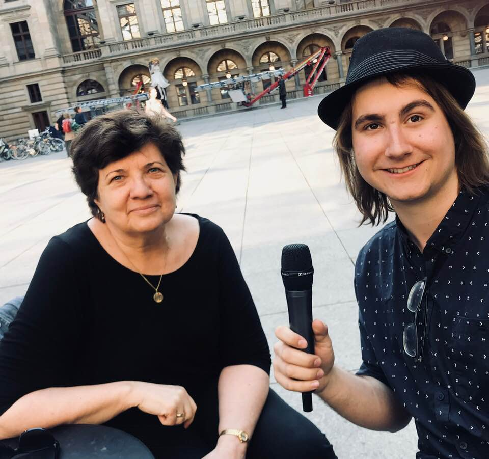 Ondřej Syrový se spisovatelkou Marií Formáčkovou po rozhovoru u Národního divadla v Praze